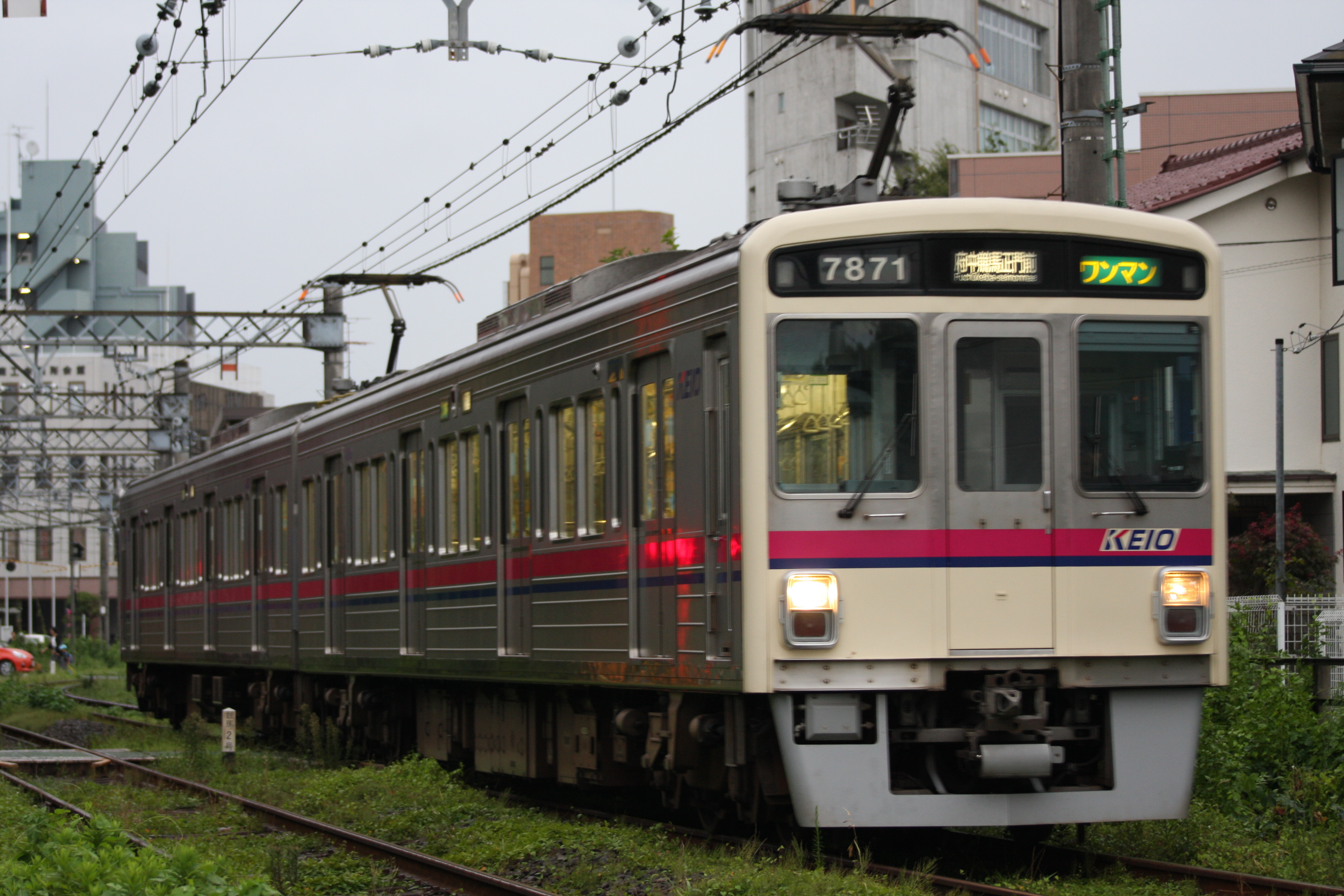 東府中 - 府中競馬正門前駅間にて。 7821Fによるワンマン列車。